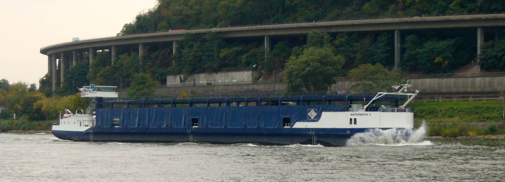 Autotransporter WATERWAYS 3 ENI Number: 06004026 IMO Number: 9280407